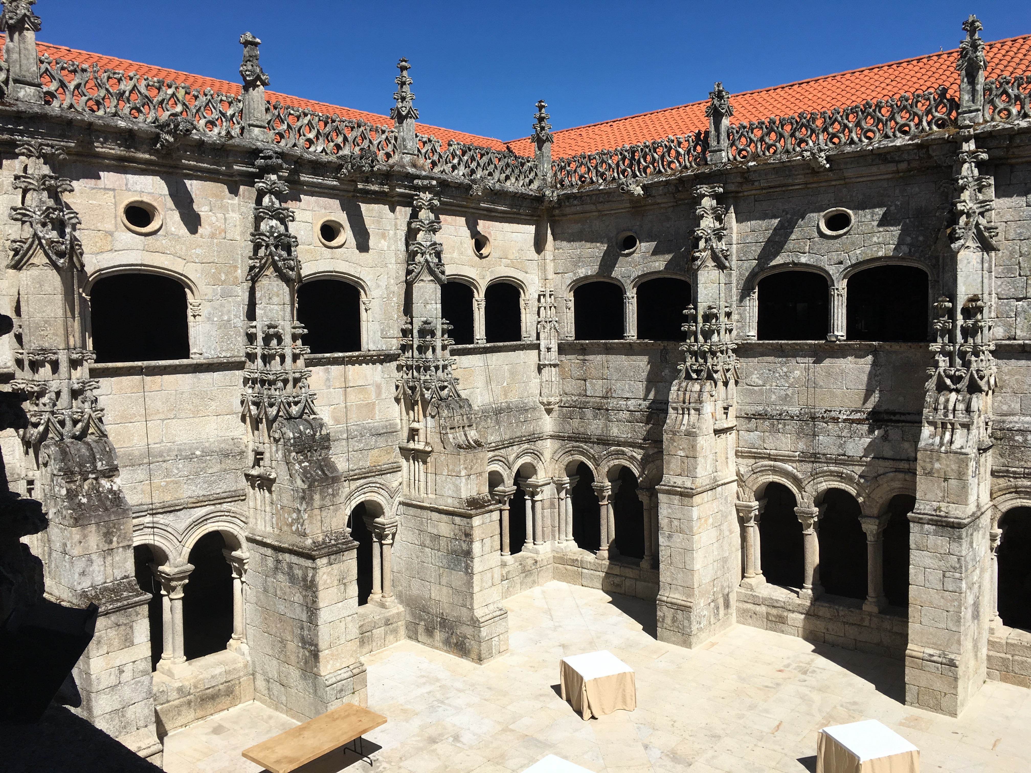 Santo Estevo de Ribas de Sil. Claustro de los Obispos.